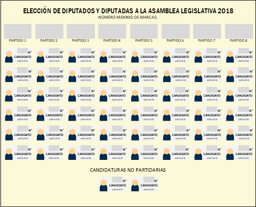 Modelo de papeleta de votación para elecciones legislativas de 2018 en El Salvador